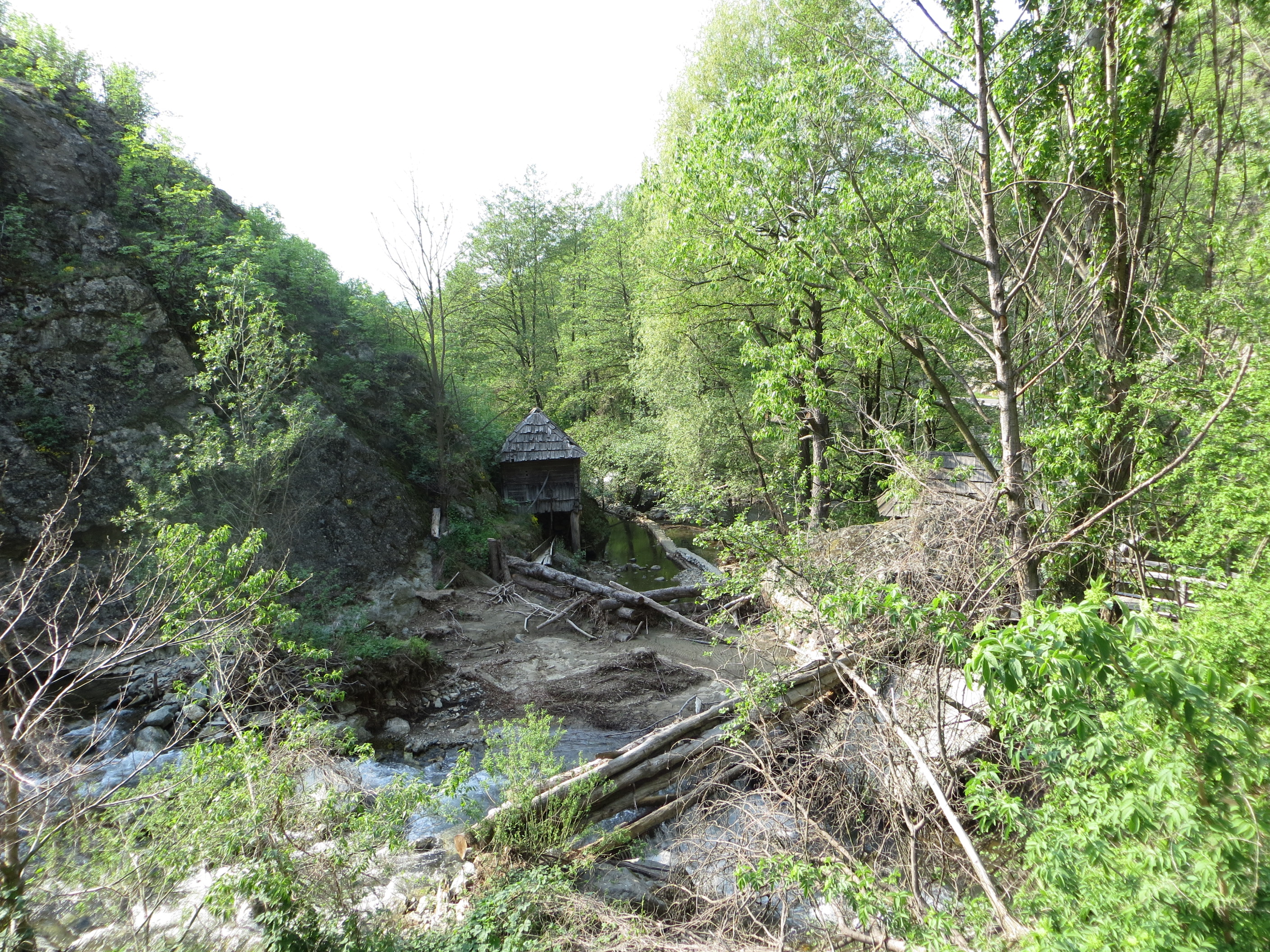 Ansamblul de mori din Eftimie Murgu - moara "de la perete" (zisă și "Îndărătnica mică") și baraj din lemn 07